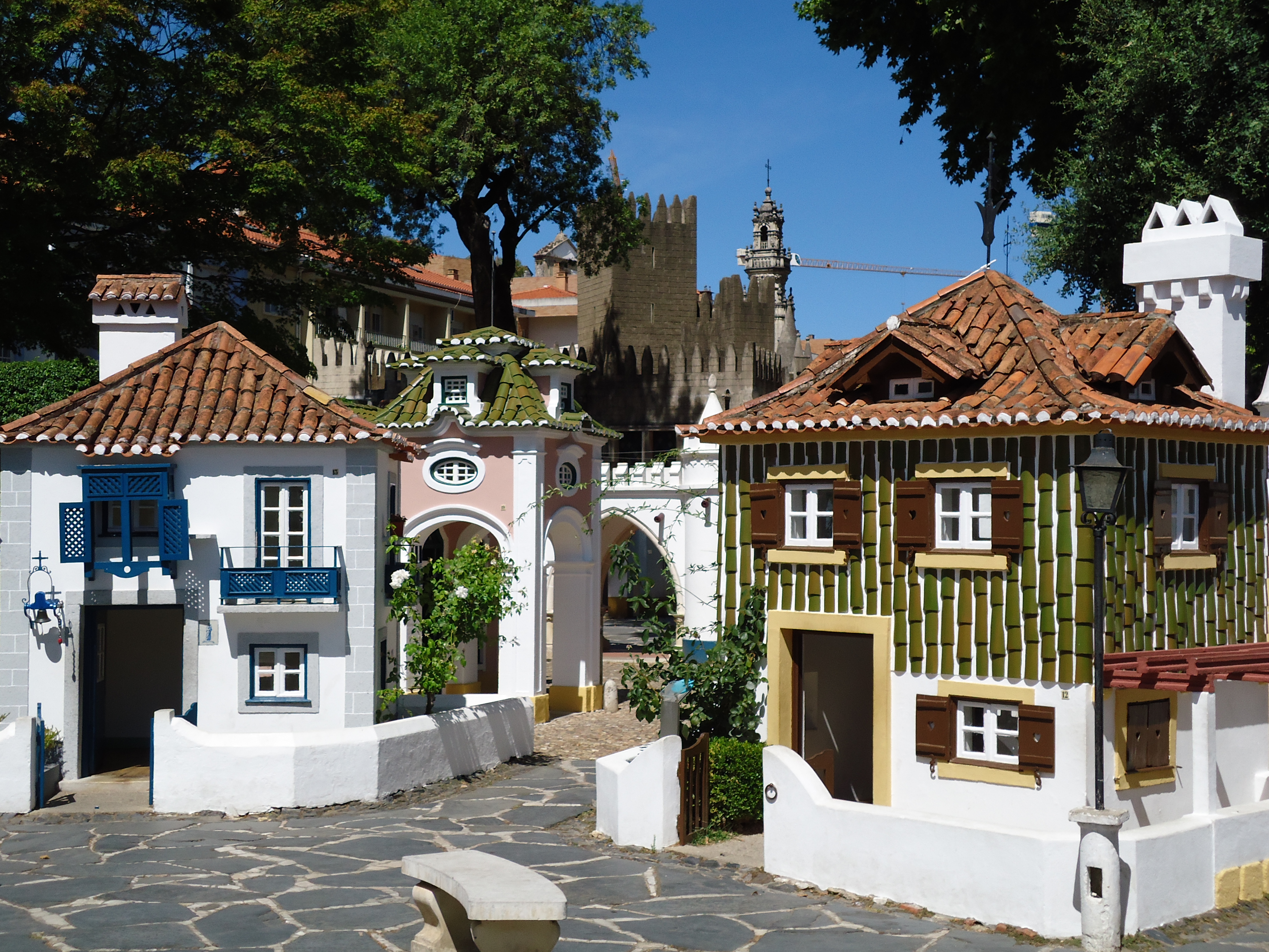 Portugal dos Pequenitos, Coimbra, Portugal: área das Casas Regionais (detalhe).